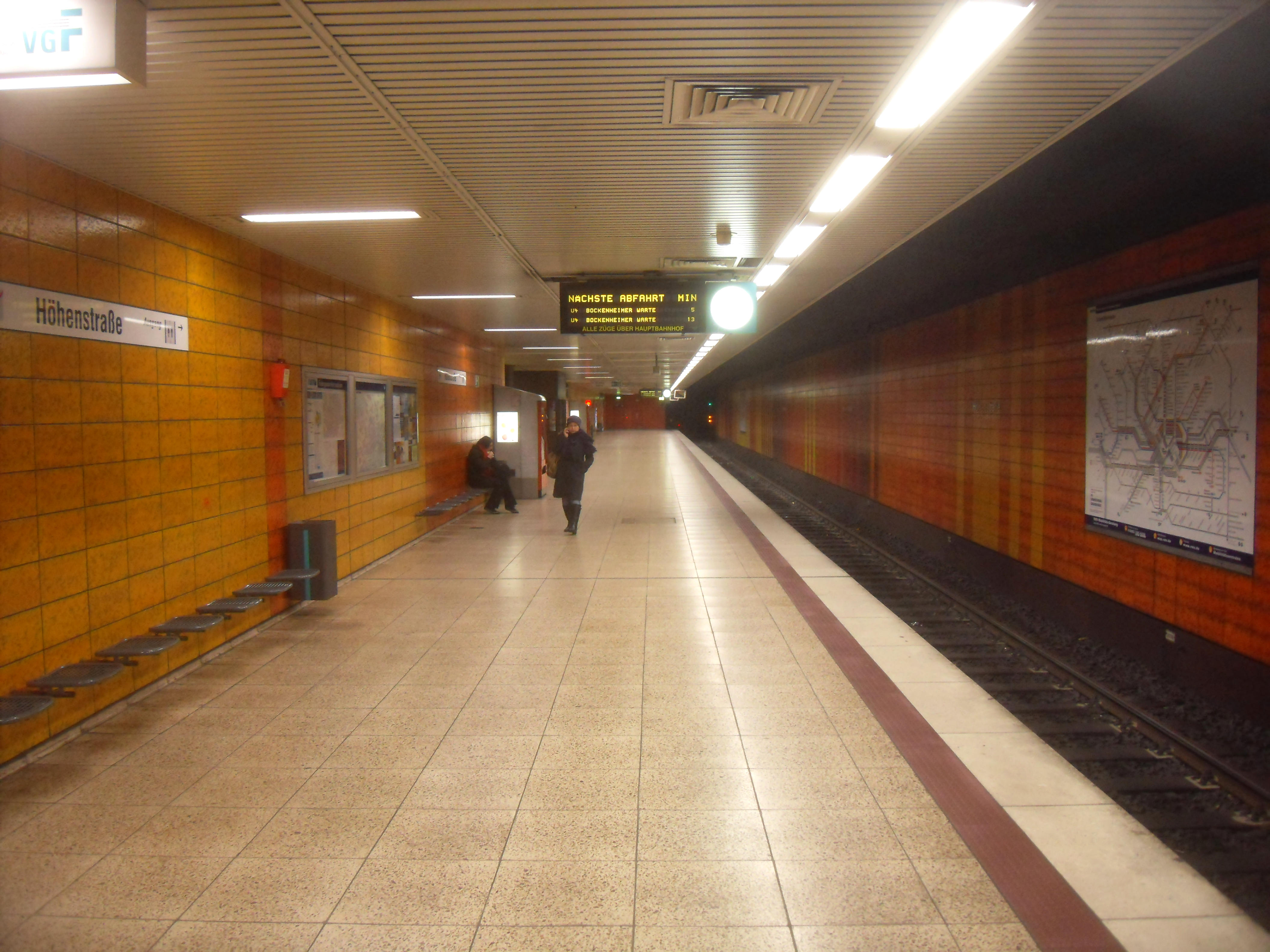 Bahnsteig der D-Ebene des U-Bahnhofs Höhenstraße (Richtung Bockenheimer Warte) der U-Bahn Frankfurt auf der Linie U 4 in Hessen (Deutschland)